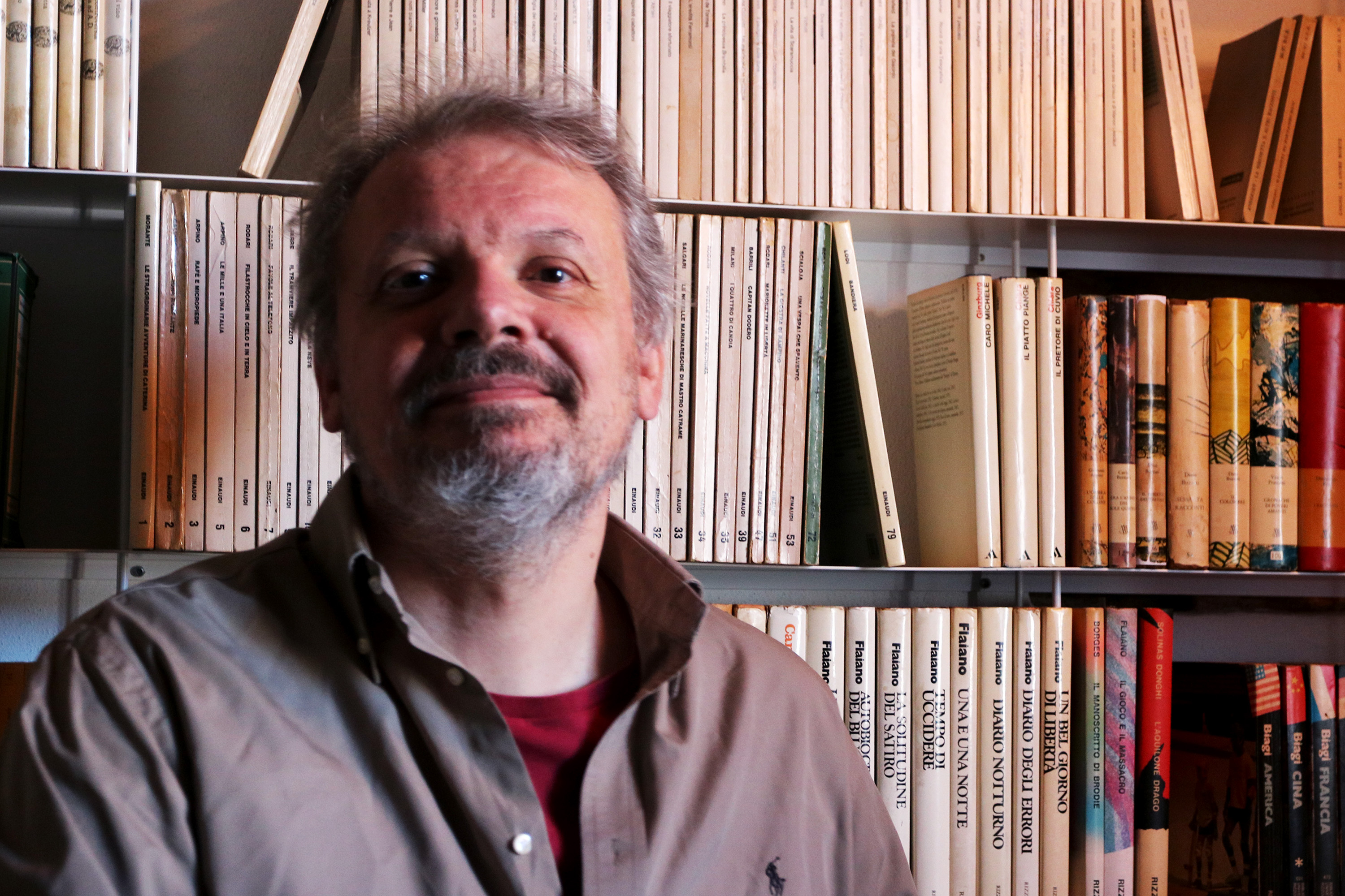 Andrea Valente